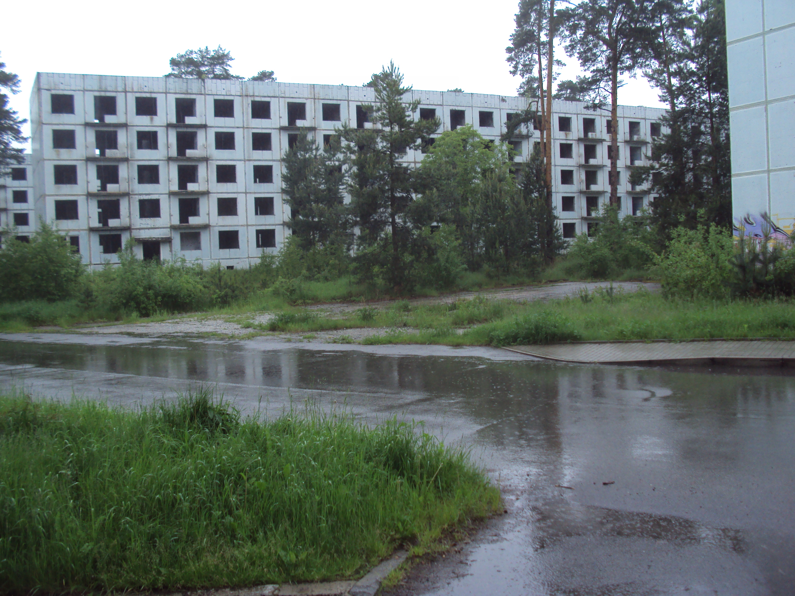 Sídliště v Ploužnici, část paneláků je trvale prázdných